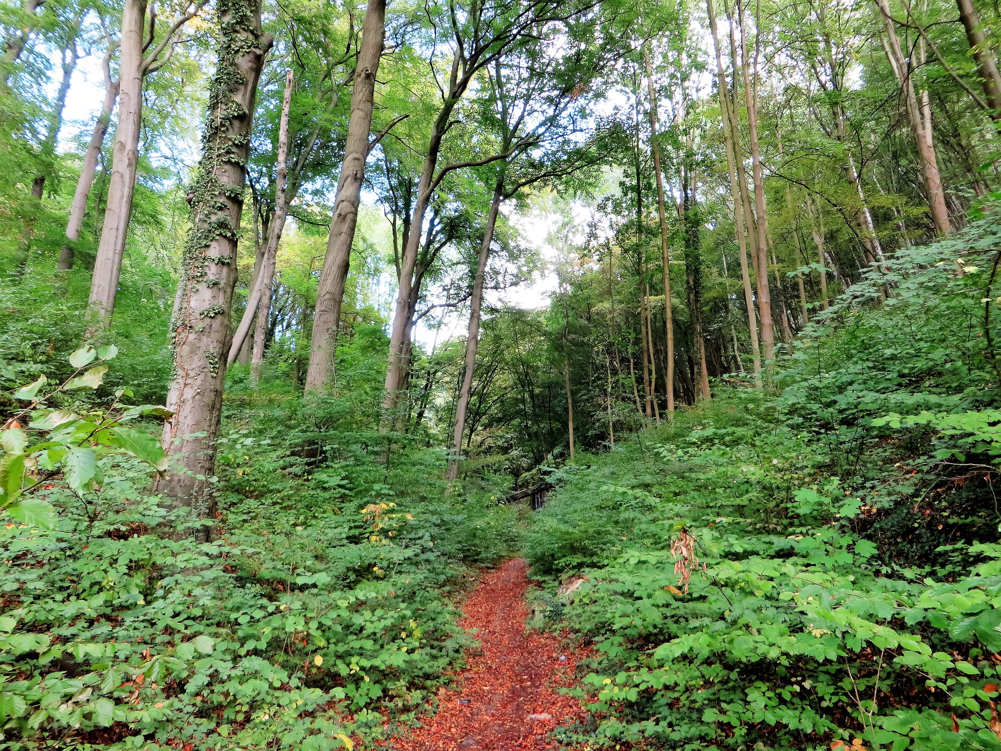 Wanderweg „Strunkschlenke“ durch das Naturschutzgebiet „Steltenberg“ in Hagen-Hohenlimburg, zwischen Oeger Straße und den Siedlungen „Auf der Heide“ und „Im Sibb“, sowie zur Steinbruchkante der Hohenlimburger Kalkwerke.